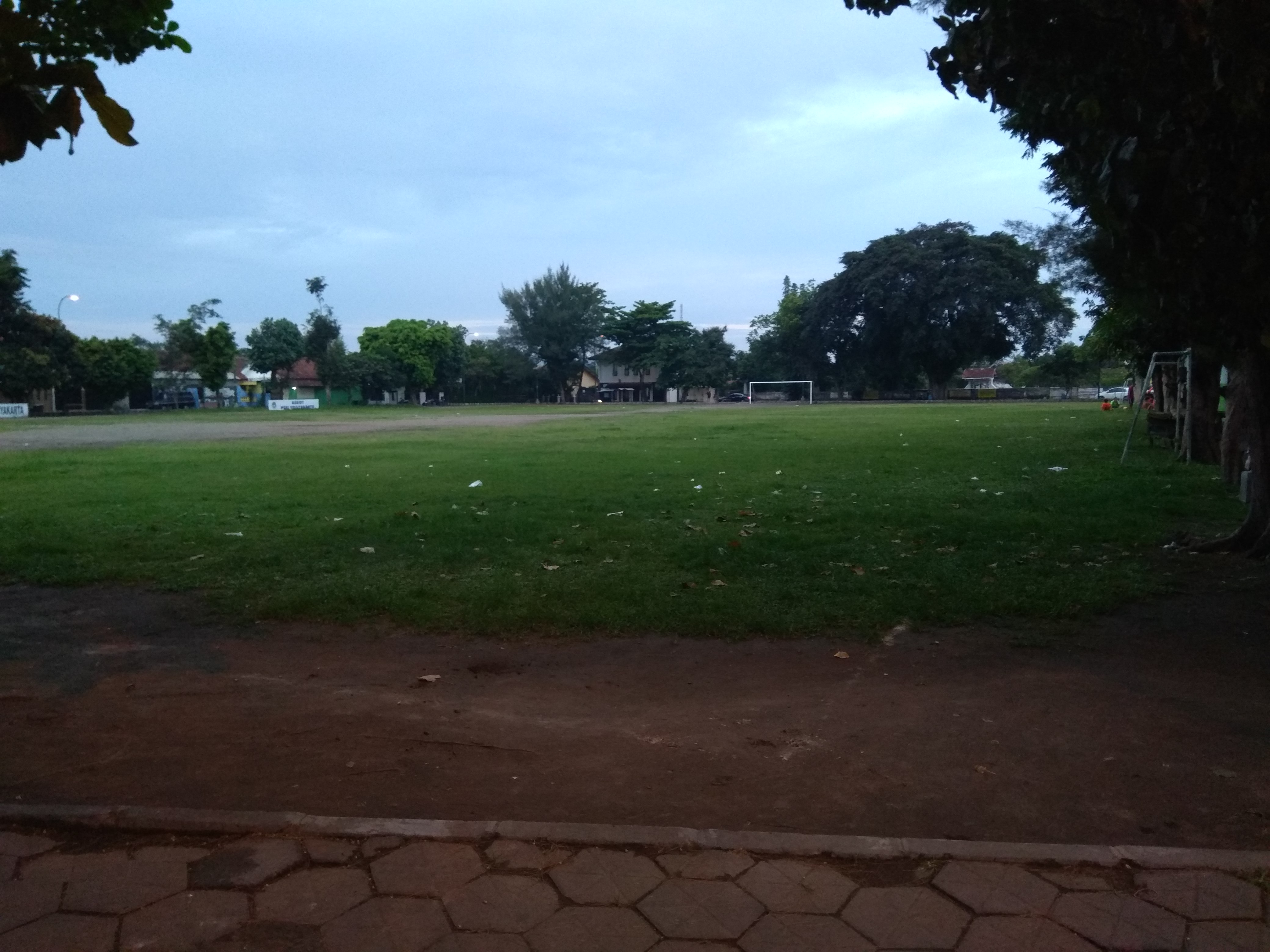 Lapangan Karang Kotagede dari sisi Barat Laut